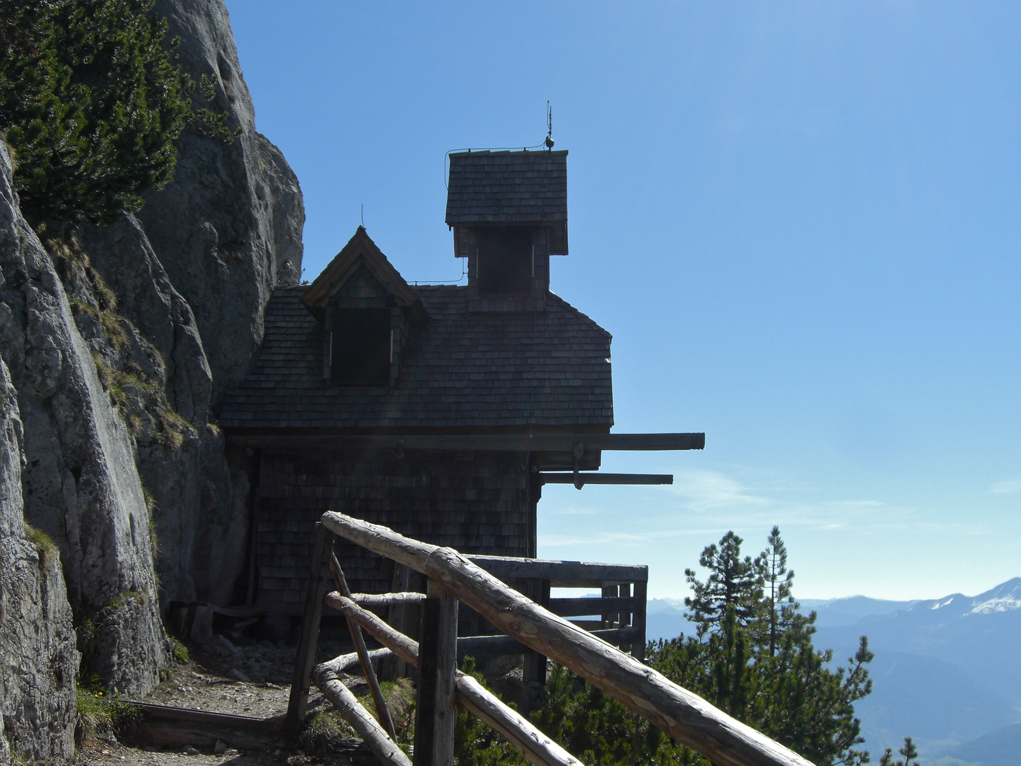 Das Friedenskircherl auf dem Stoderzinken in Österreich in der Gemeinde Aich, Nähe Gröbming.